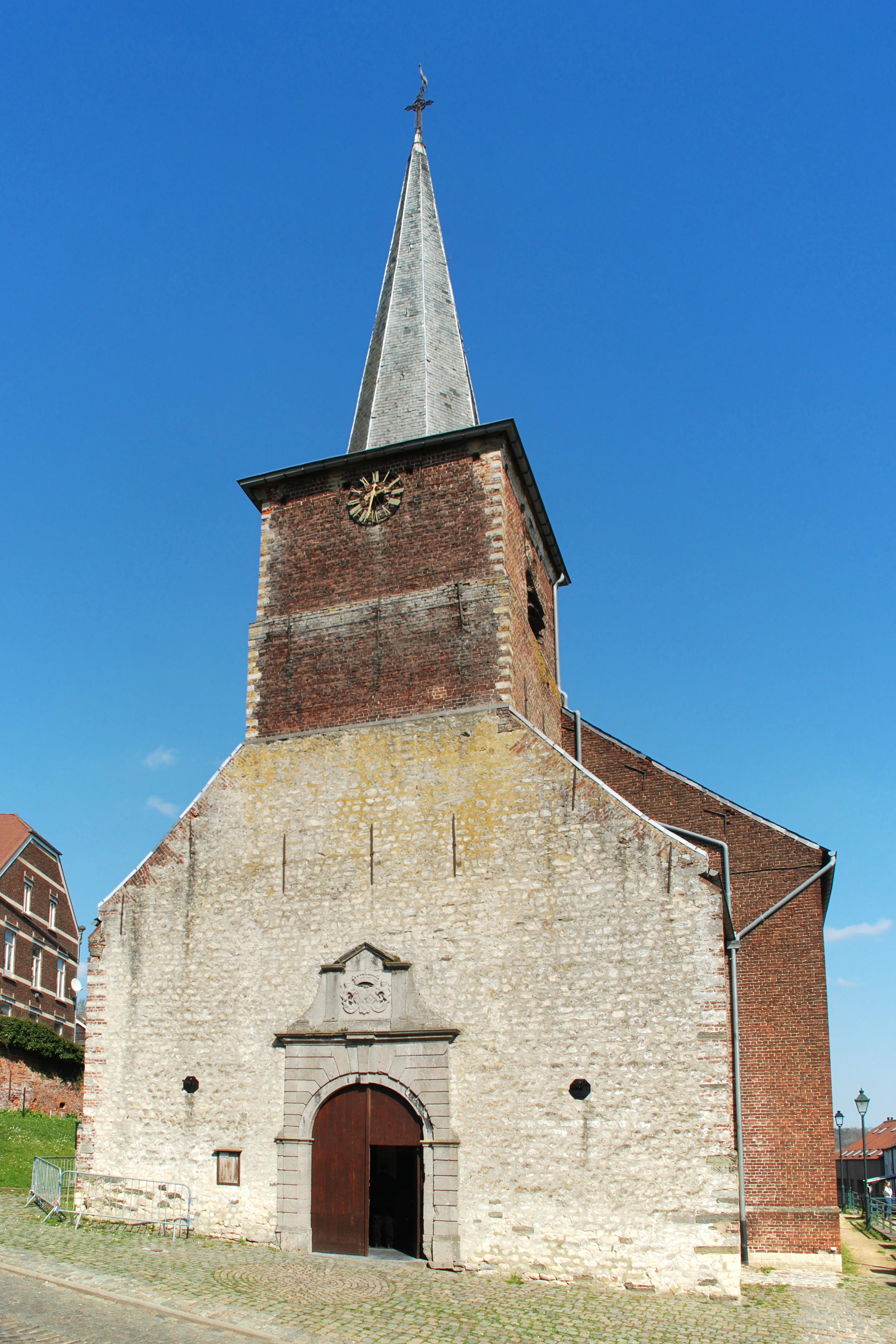 Belgique - Brabant wallon - Bousval - Église Saint-Barthélemy